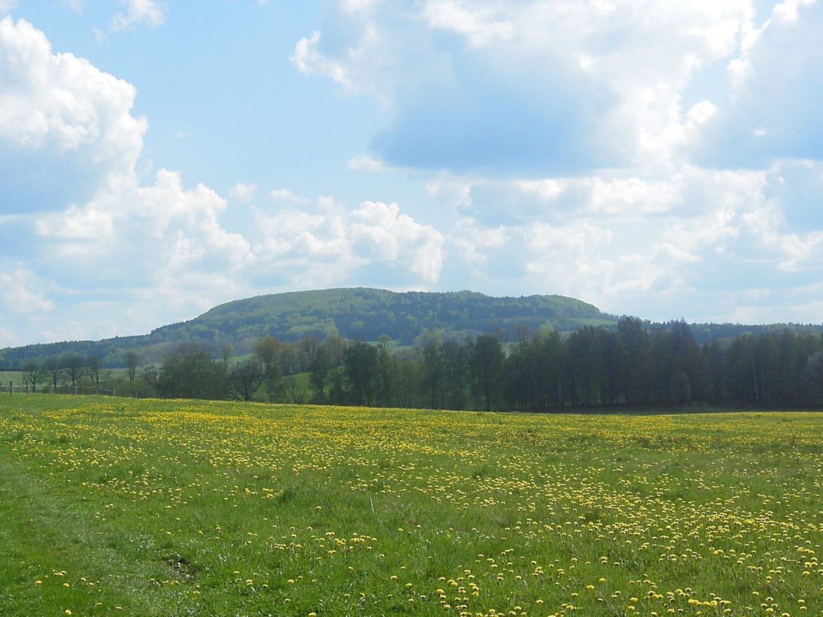 Hrazený, foceno od Vébrovy chaty